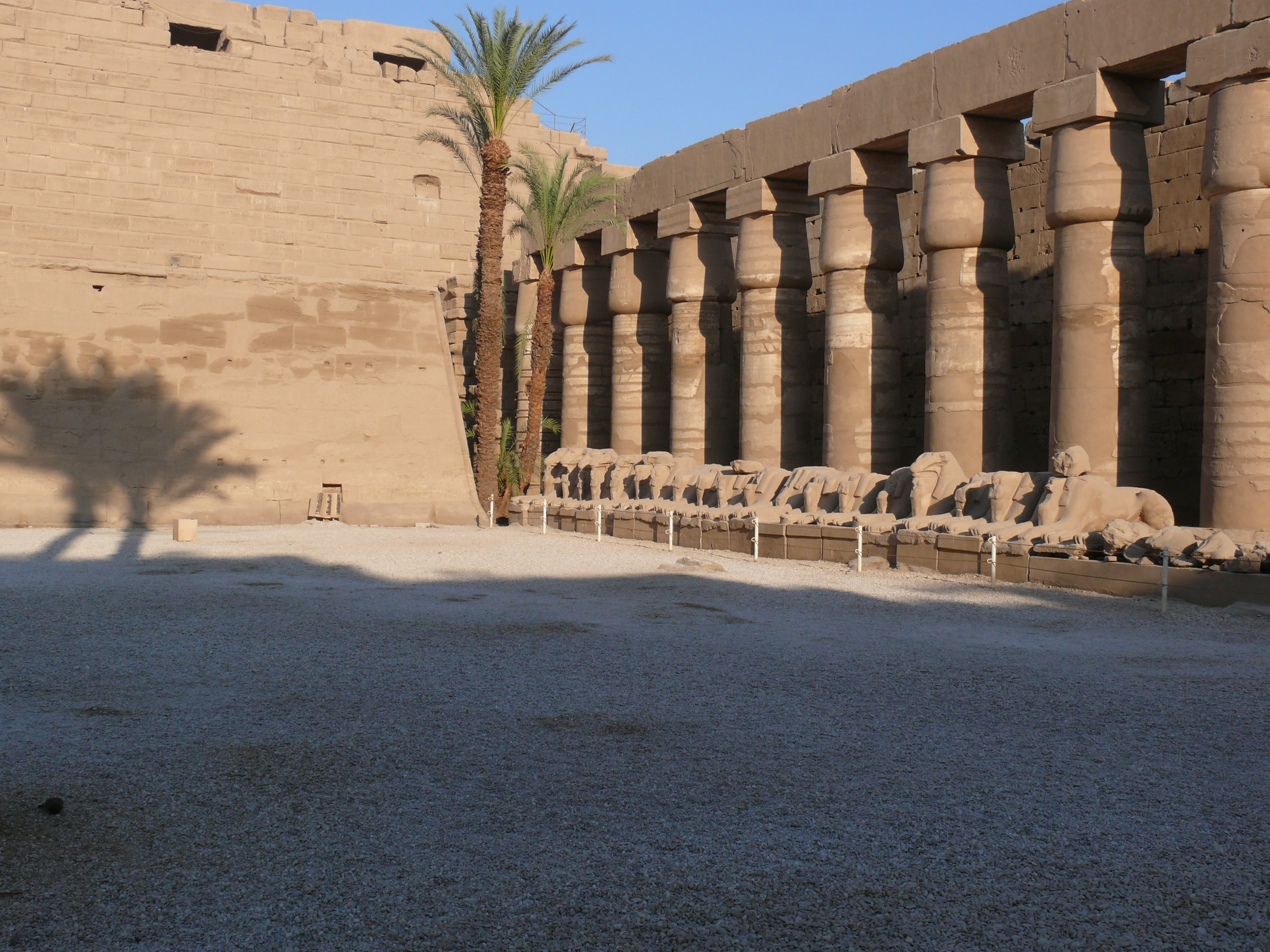 Karnak: Tempel Foto: Orientalist